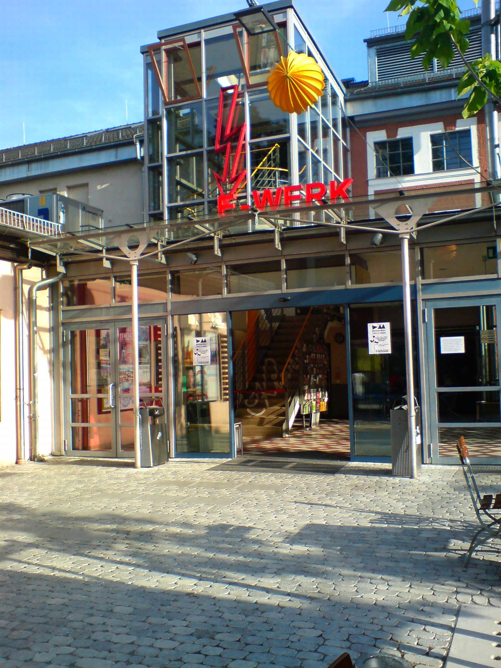 E-Werk Erlangen, Eingang